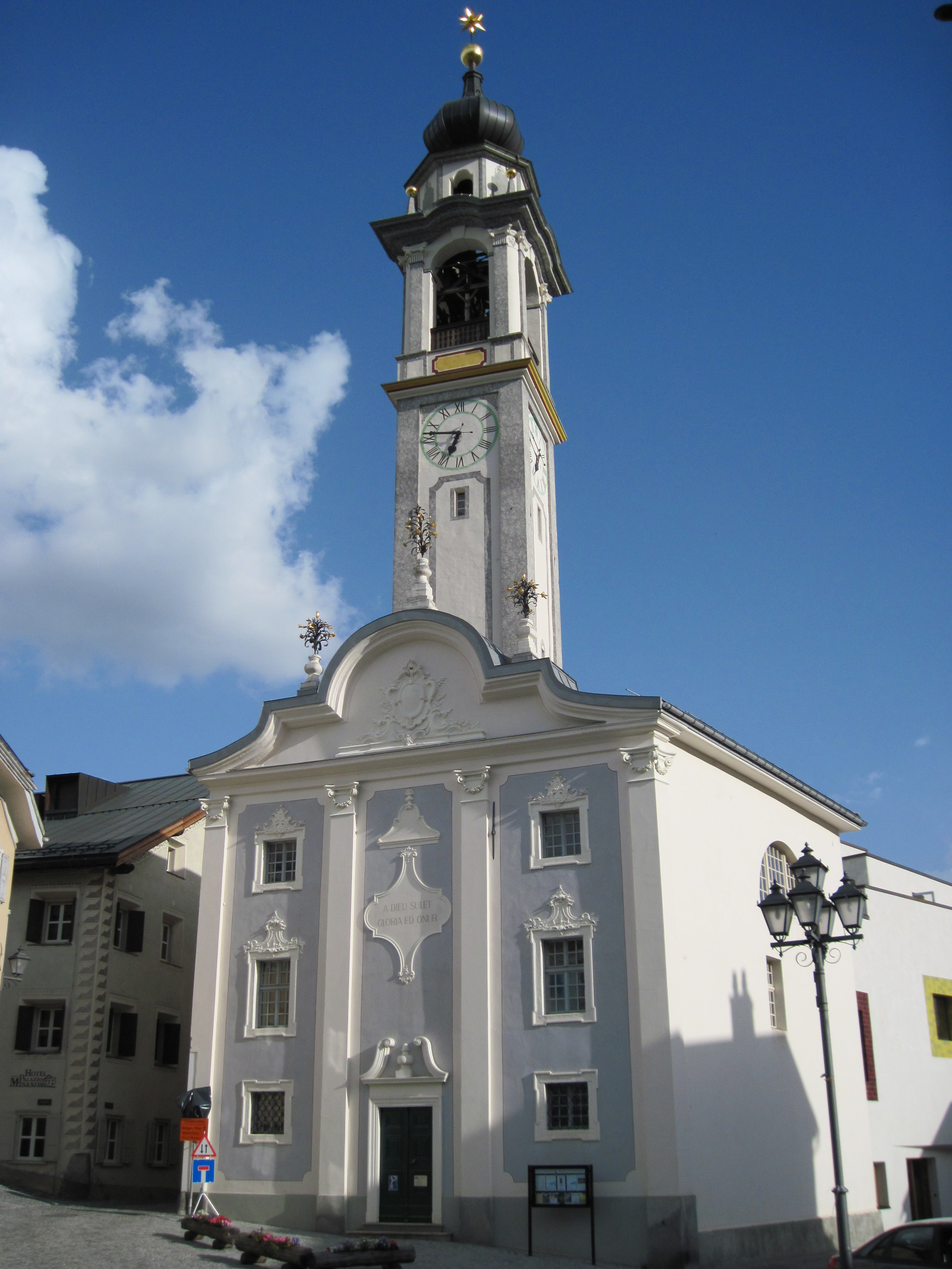 reformierte Dorfkirche in Samedan (Kanton Graubünden)